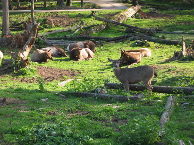 deer, Vancouver Area Zoo, April 2004